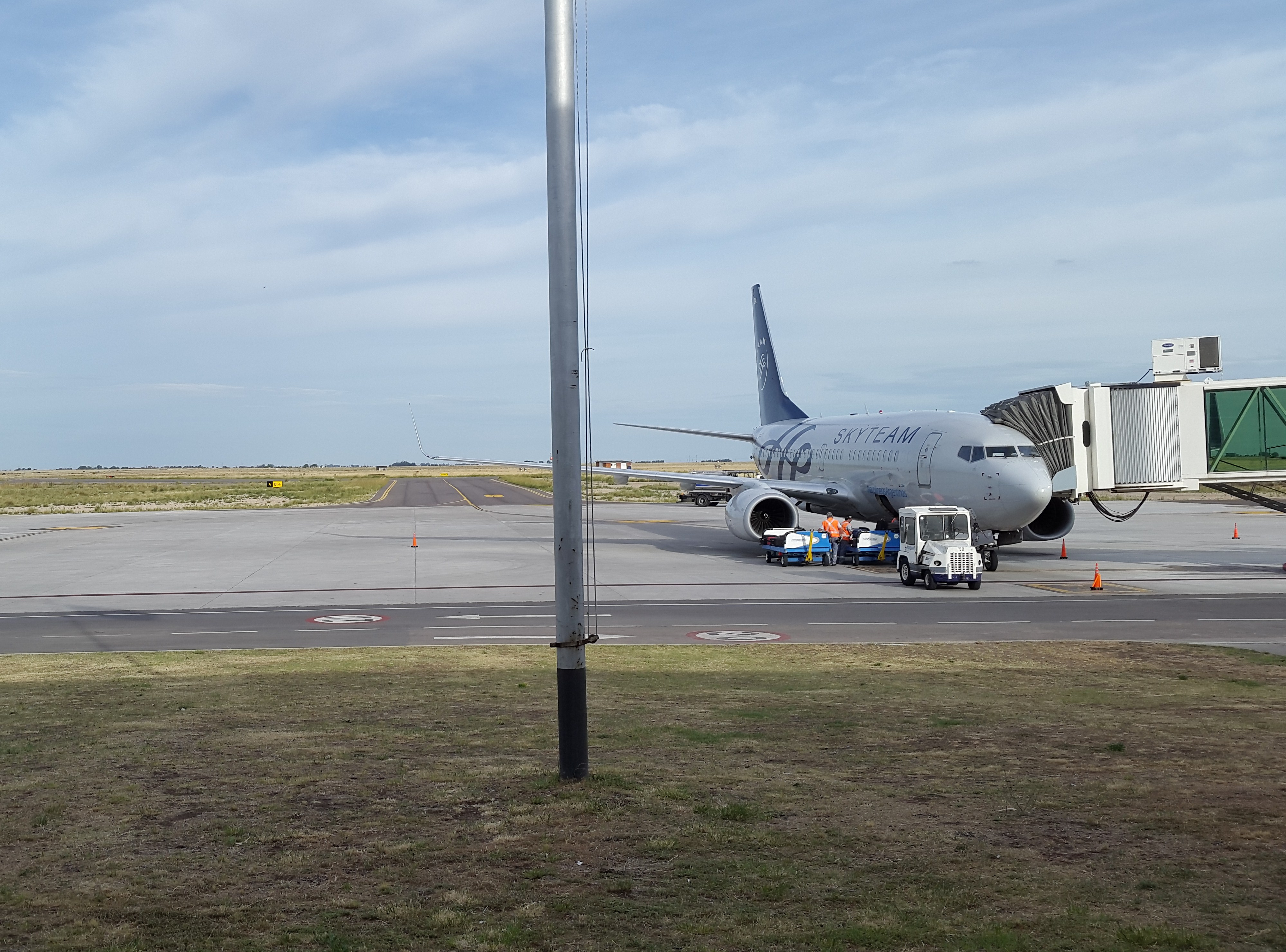 Avión de Aerolineas Argentinas en la manga de embarque